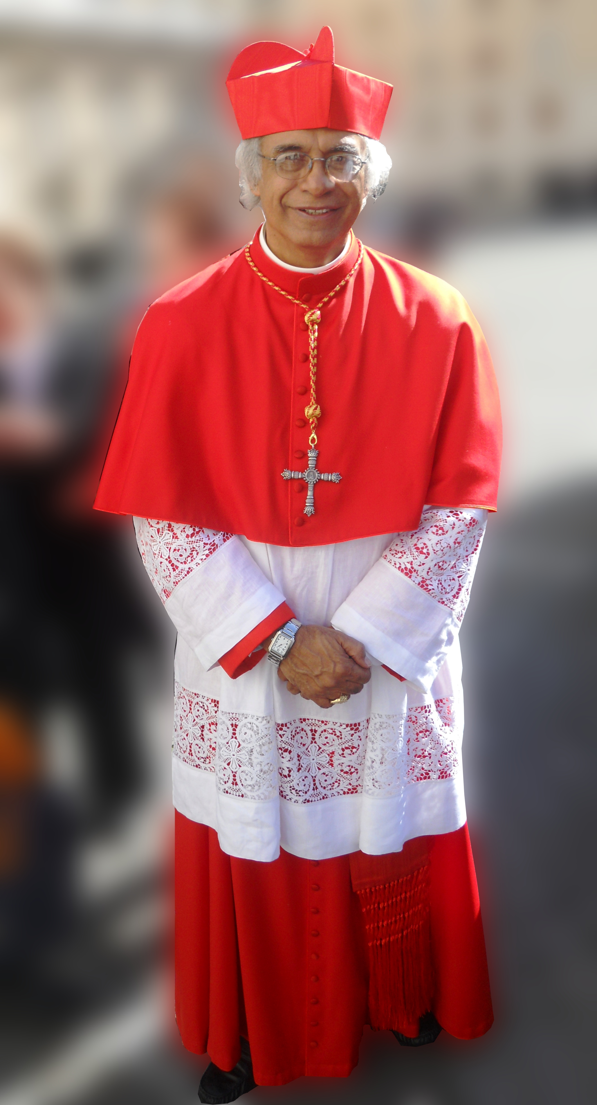 Leopoldo José Cardinal Brenes Solórzano